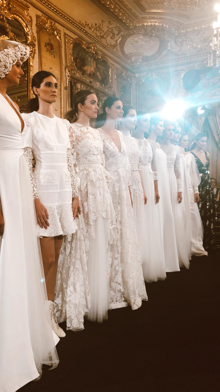 Pasarela de Alta Costura Atelier Couture